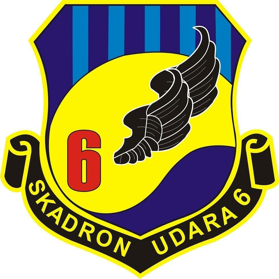 Gambar ini adalah Lambang Skuadron Udara 6, Koops AU I